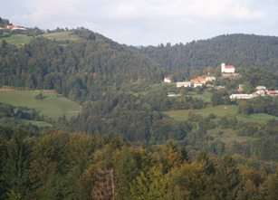 Vas Češnjice v občini Lukovica